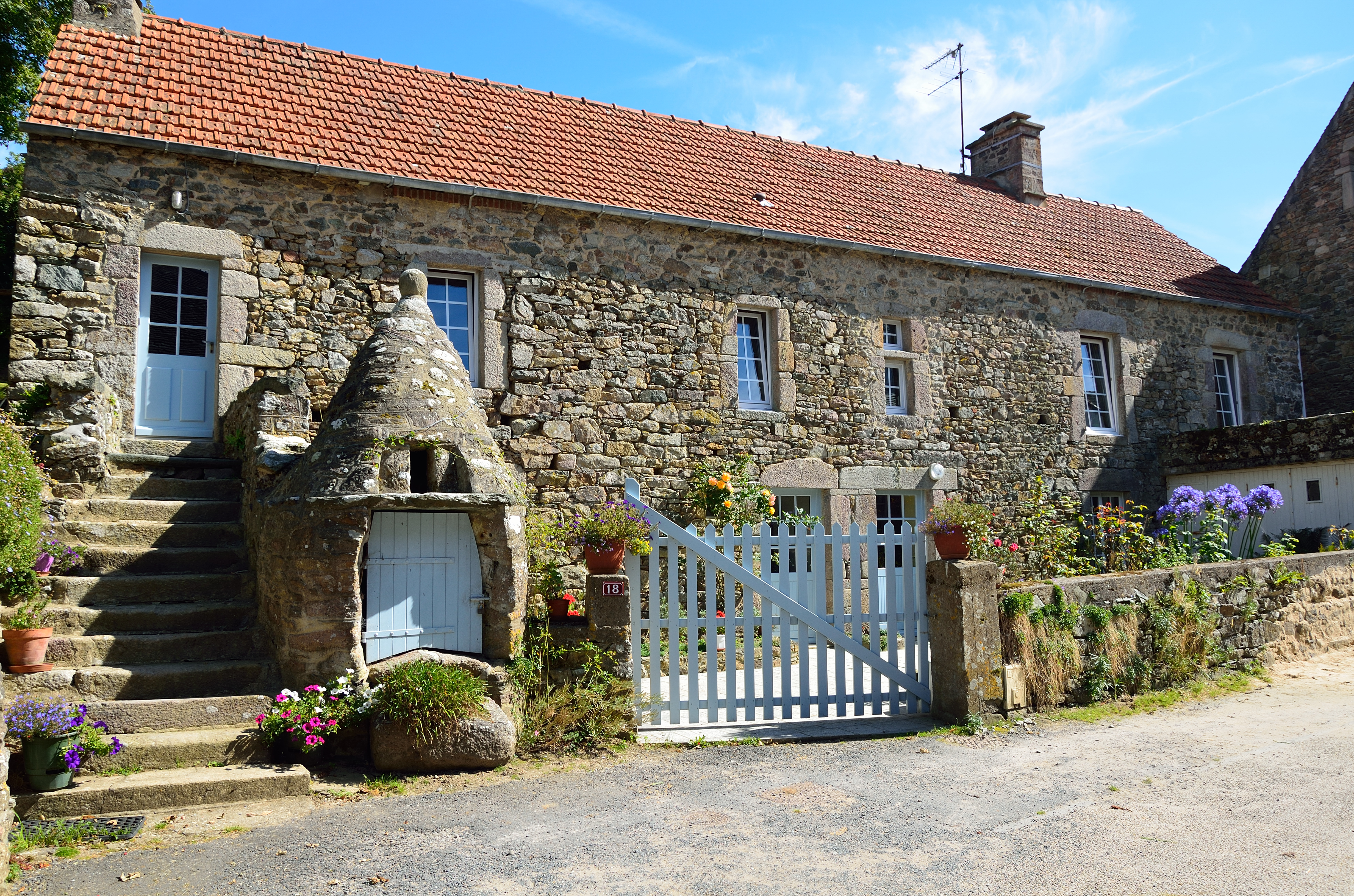 Maison au Puits, à Gréville-Hague, Manche, Basse-Normandie, France .